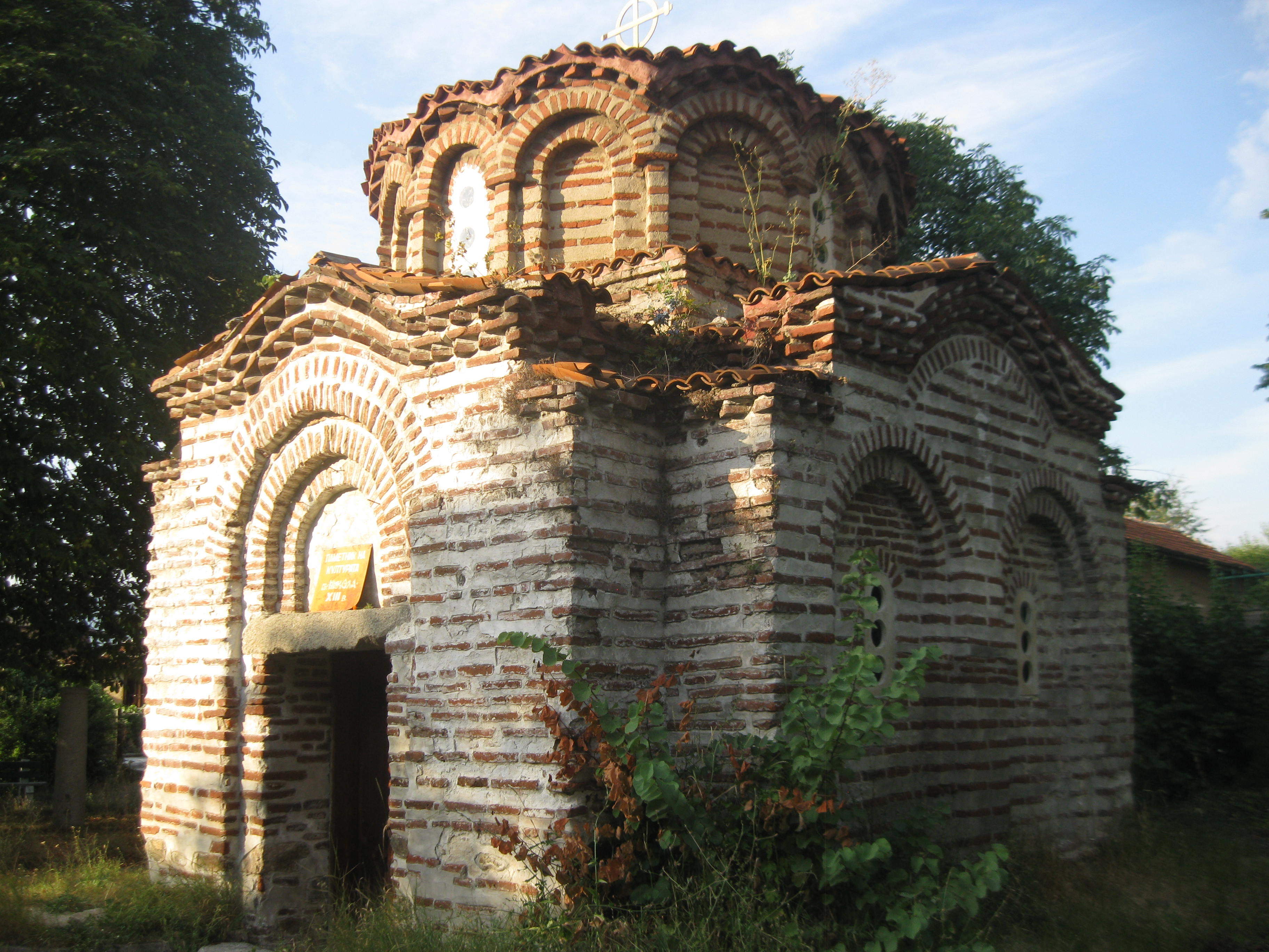 Църква "Св. Никола", гр. Сапарева баня